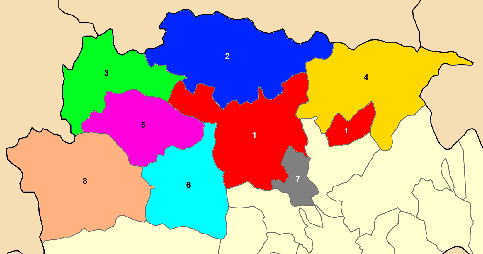 Χάρτης των ενοτήτων (και πρώην δήμων) από τις οποίες αποτελείται ο Δήμος Καλαμπάκας